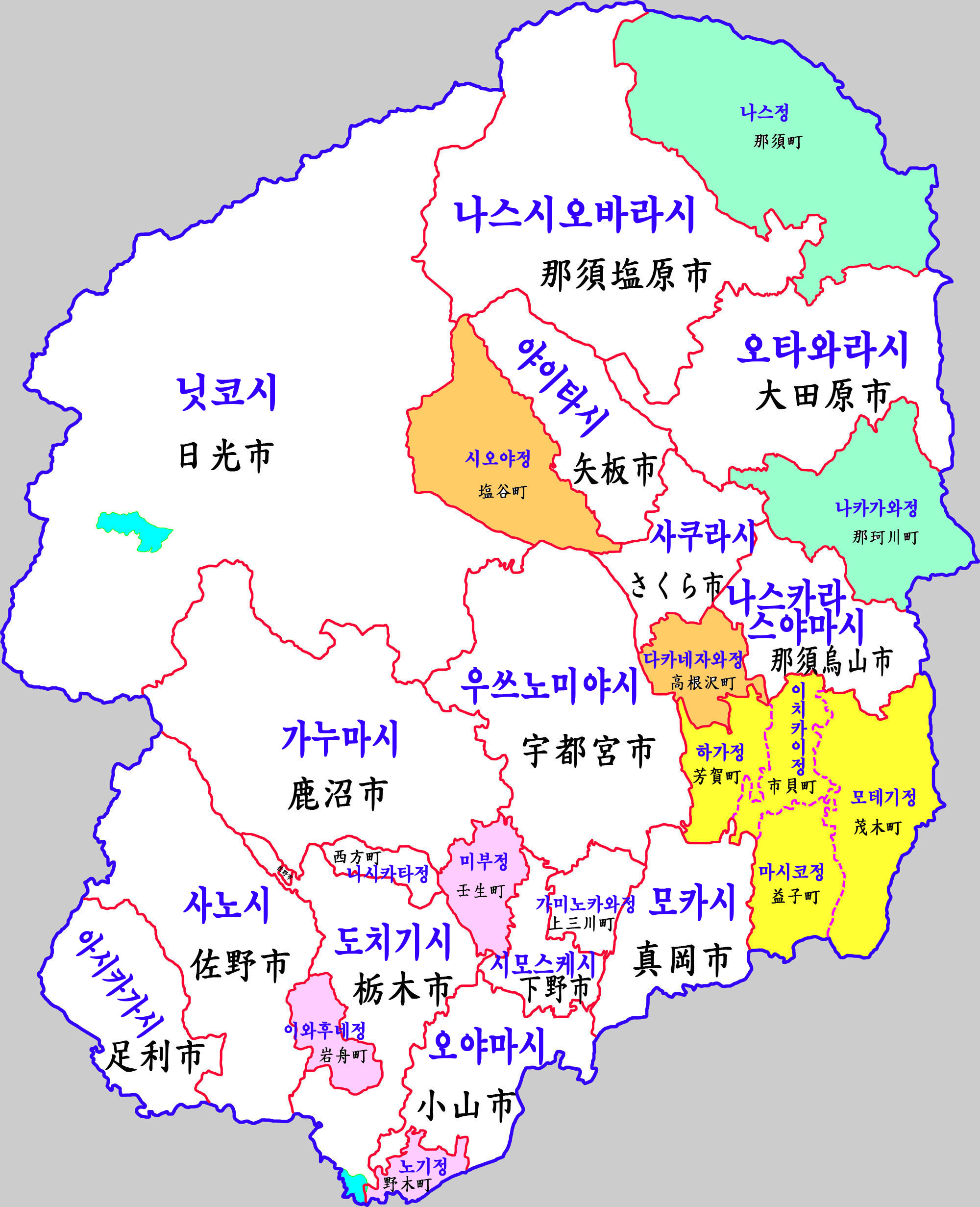 도치기현 행정구역